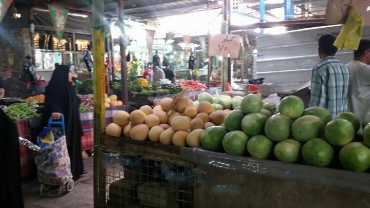 سوق شعبي في عراق حي الجهاد